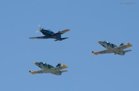 Празник на авиацията